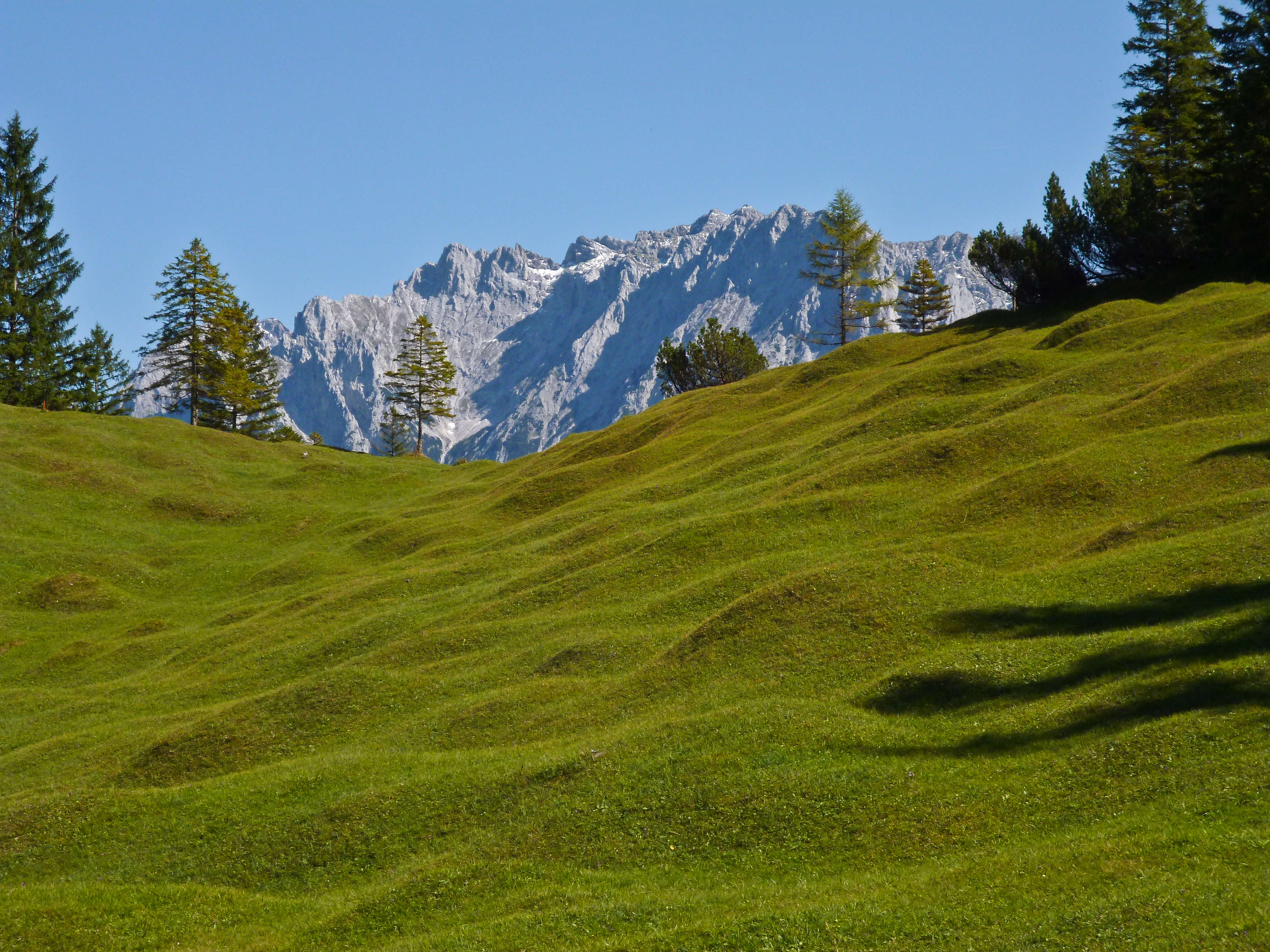 Buckelwiese unterhalb der Ferchenseewände in der Nähe von Mittenwald. Im Hintergrund das Karwendel